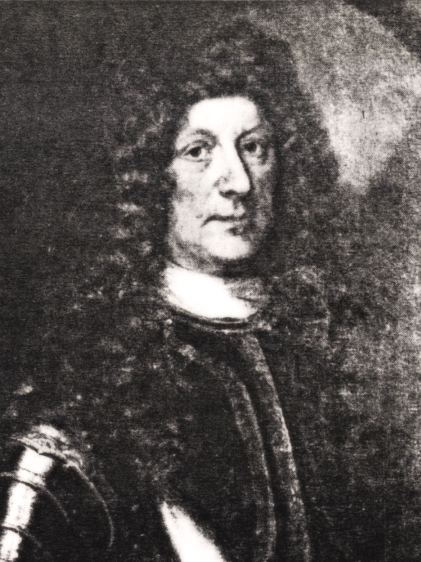 Portrait of Hans von Fersen (1625-1683)